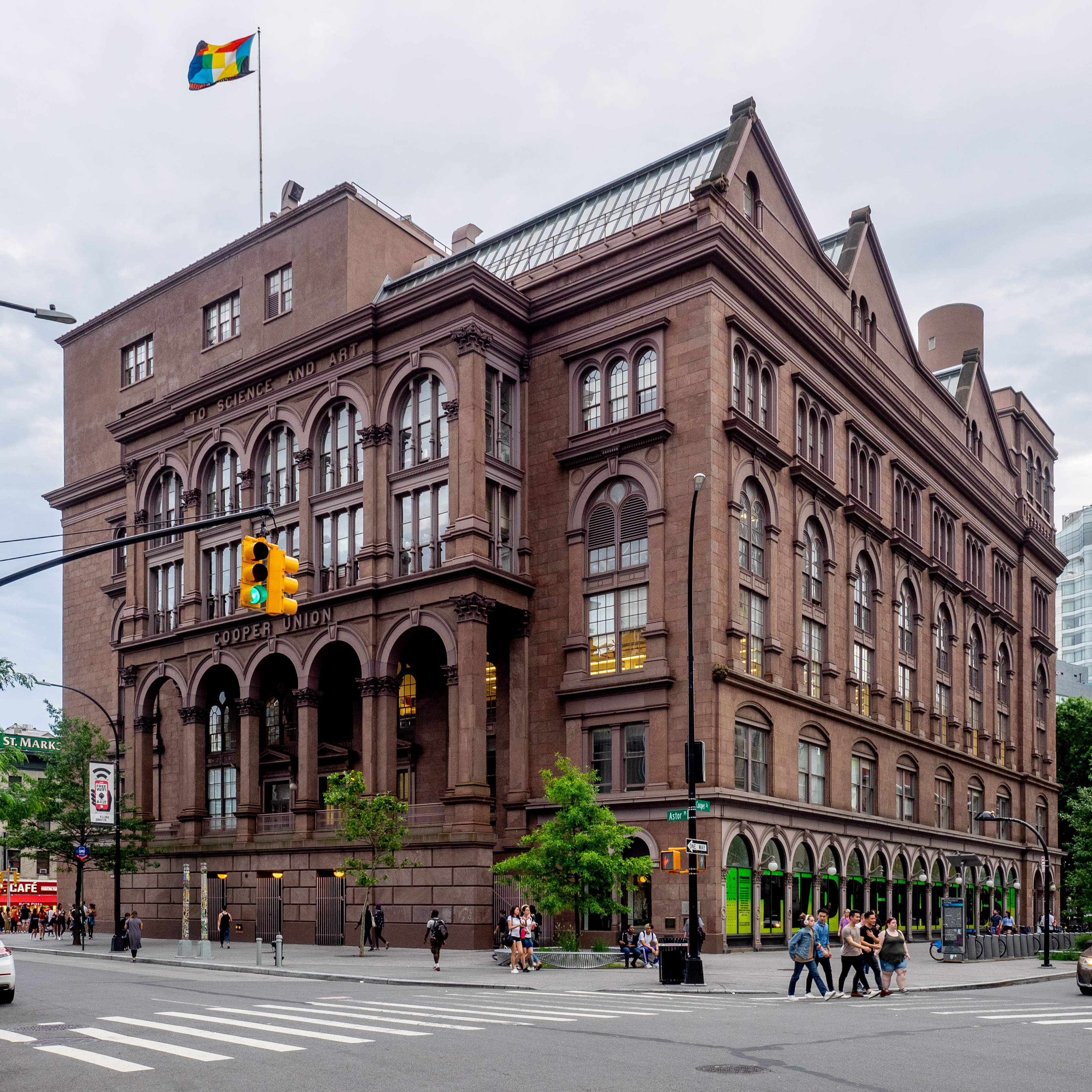 East Village, NYC